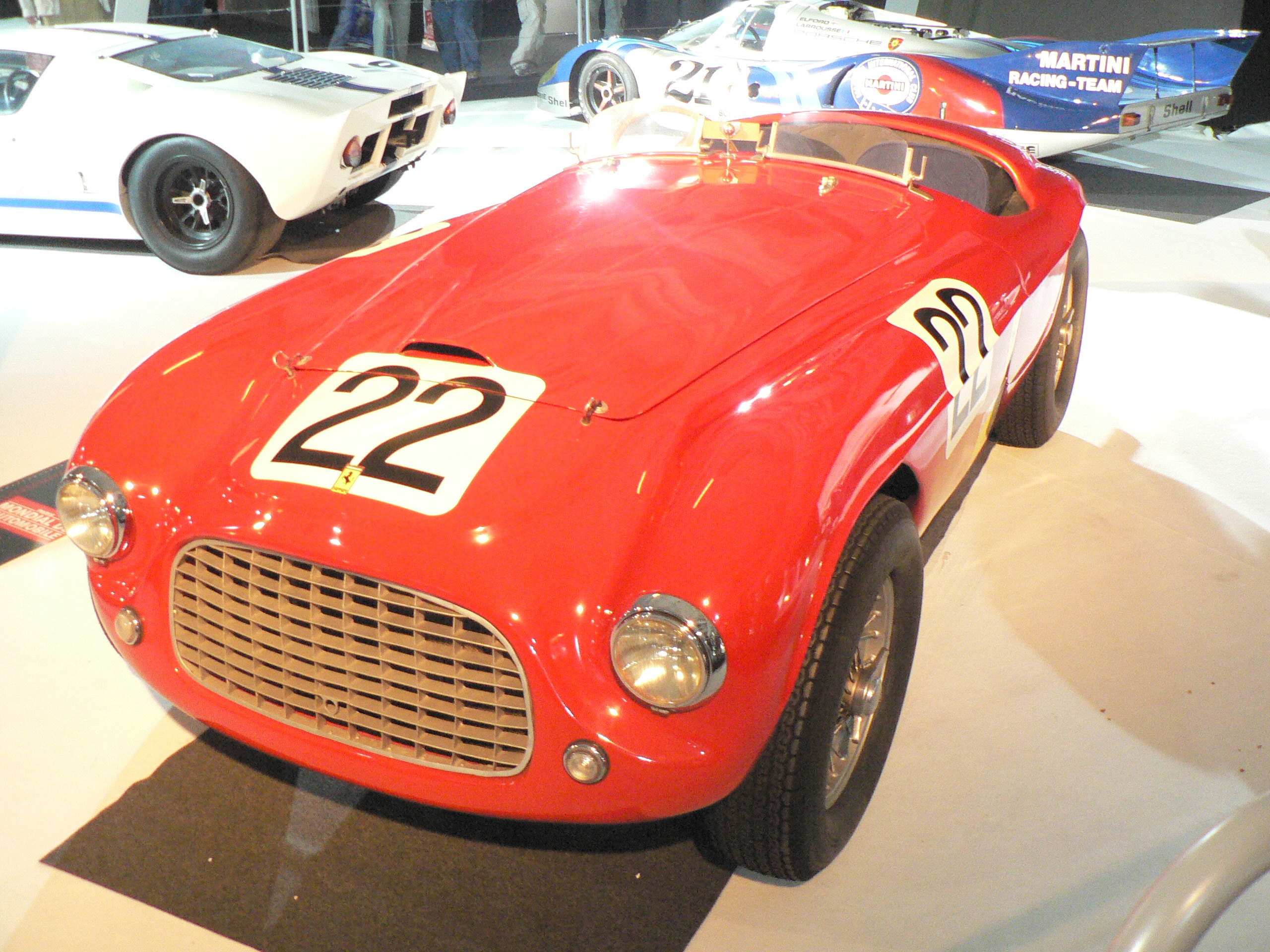 Ferrari 166 MM Touring Barchetta, telaio n. 0008M, vincitrice della 24 ore di Le Mans 1949 con l'equipaggio Chinetti-Mitchell, esposta al Mondial de l'automobile de Paris nel 2006 Mondial de l automobile de Paris (October 2006)